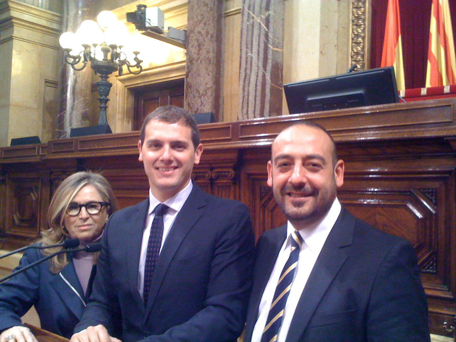 Los tres diputados de C's. Albert Rivera, Carmen de Rivera y Jordi Cañas